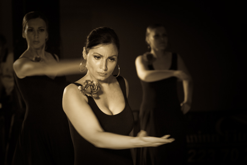 posición en el baile flamenco.